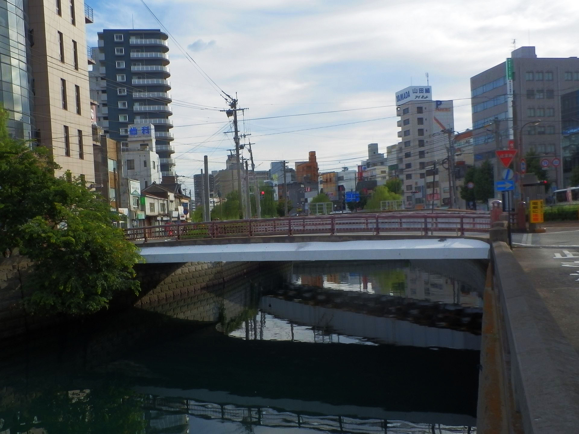 長崎市、中島川の賑橋